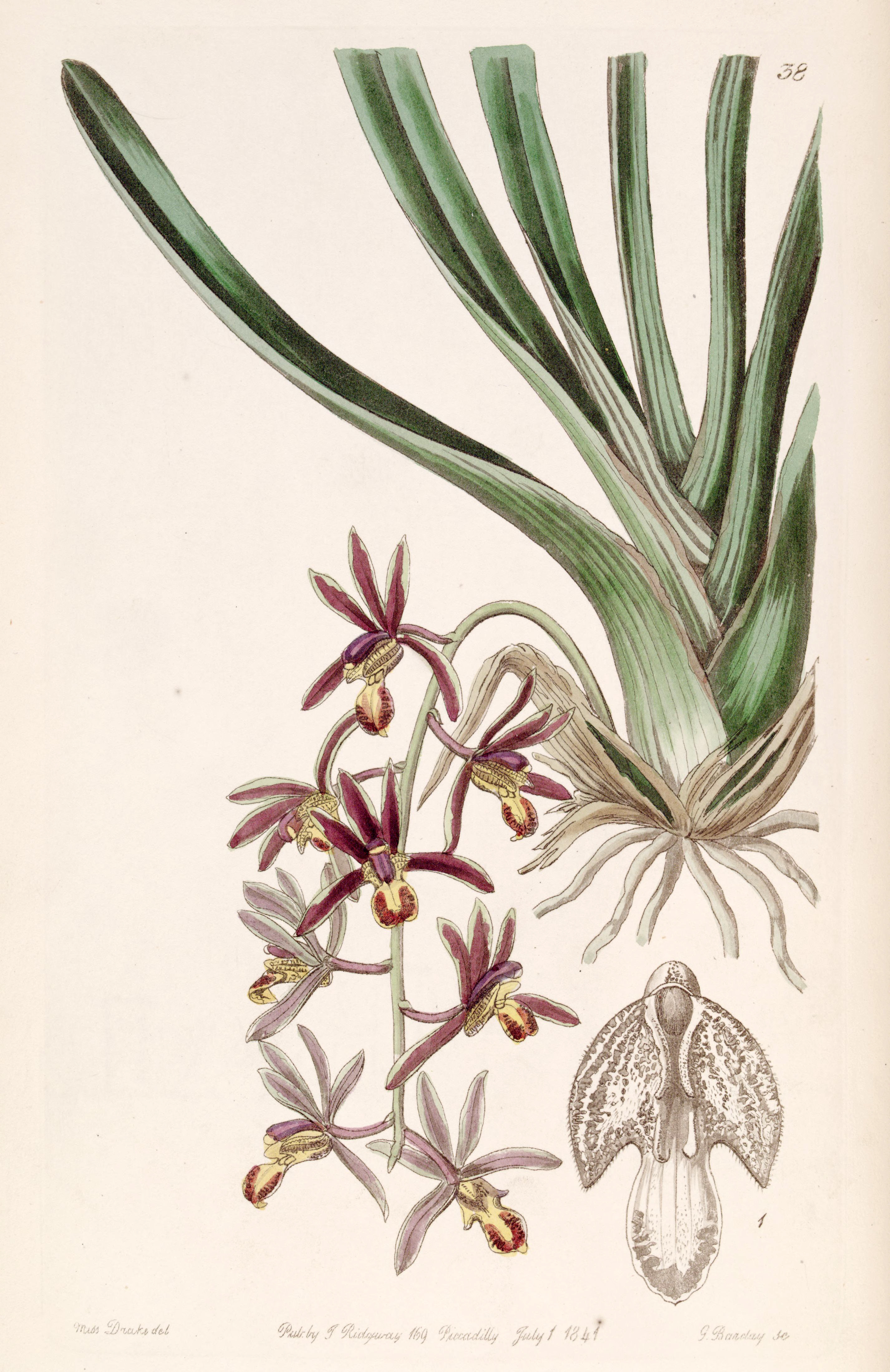 Cymbidium bicolor subsp. pubescens (as syn. Cymbidium pubescens)